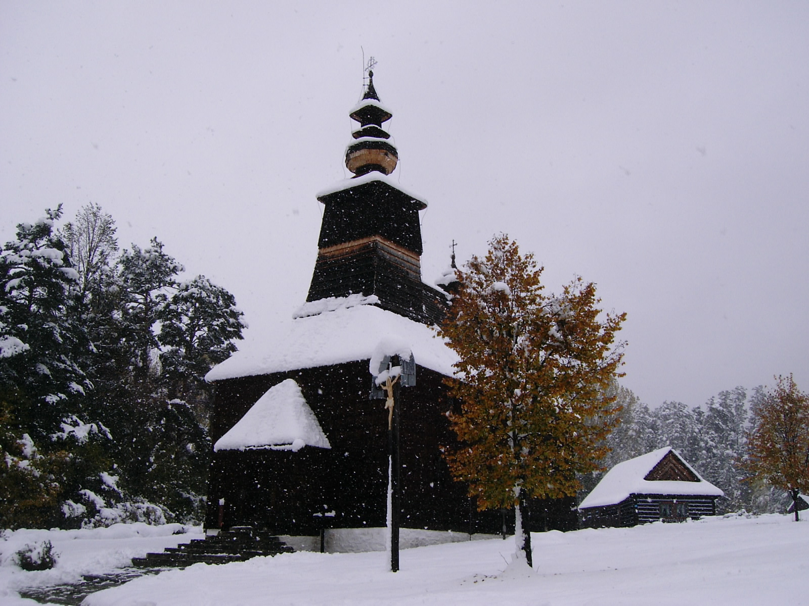 Pohľad na kostolík v skanzeme pri Ľubovnianskom hrade